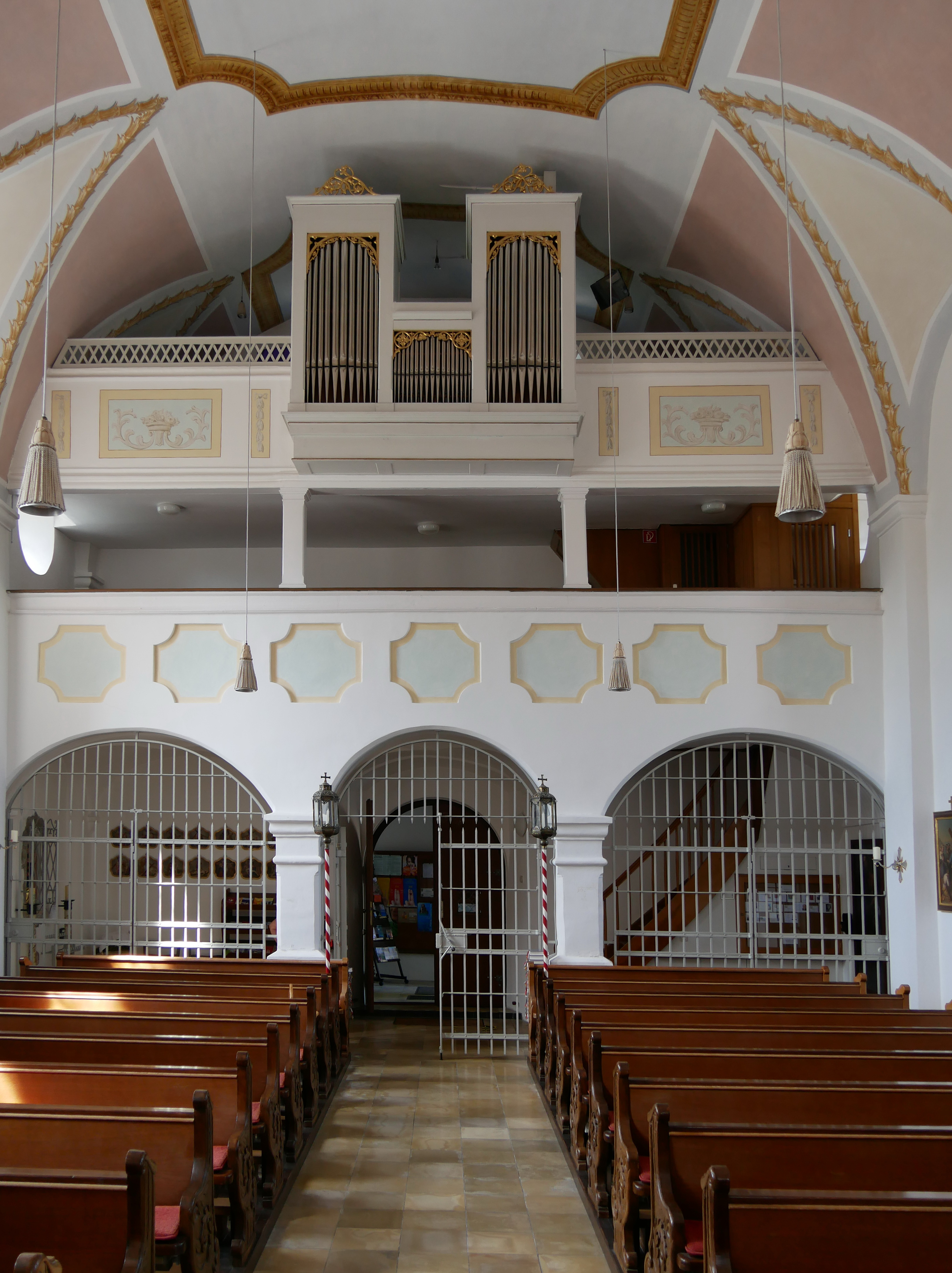 Schöngeising, Kirchstr. 6, Katholische Pfarrkirche Sankt Johann Baptist. Blick vom Altar zur Empore mit der 1867 eingebauten Orgel von Georg Beer aus Erling